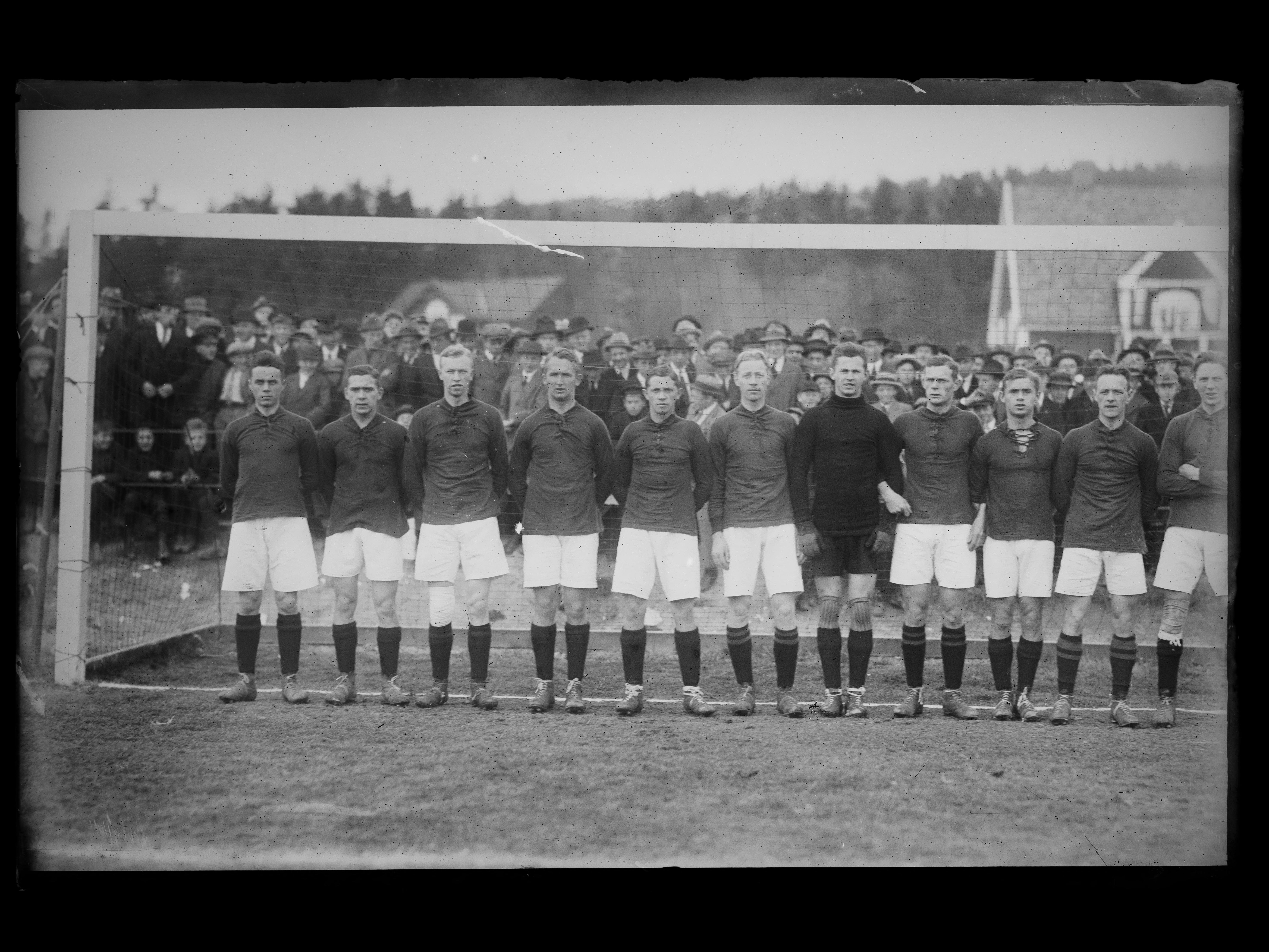 Bildet er hentet fra Nasjonalbibliotekets bildesamling. Anmerkninger til bildet var: Påskrift eske: Norgesmesterskapet Fotbol 1921 Gressbanen,Vestre Holmen, Oslo, Oslo